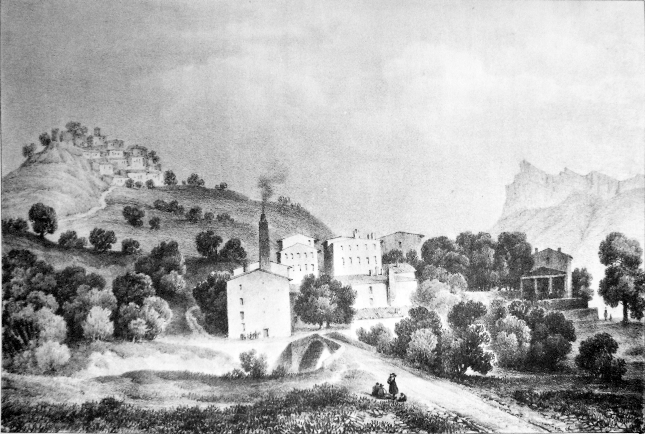 Blacons (Drome) ATTENTION ! Ce facsimilé est réalisé en applicant des alterations avec un logiciel graphique à une copie numérique, obtenue à partir d'une prise de photo faite par un non-professionnel. Elle pourrait ne pas être parfaitement réussie.